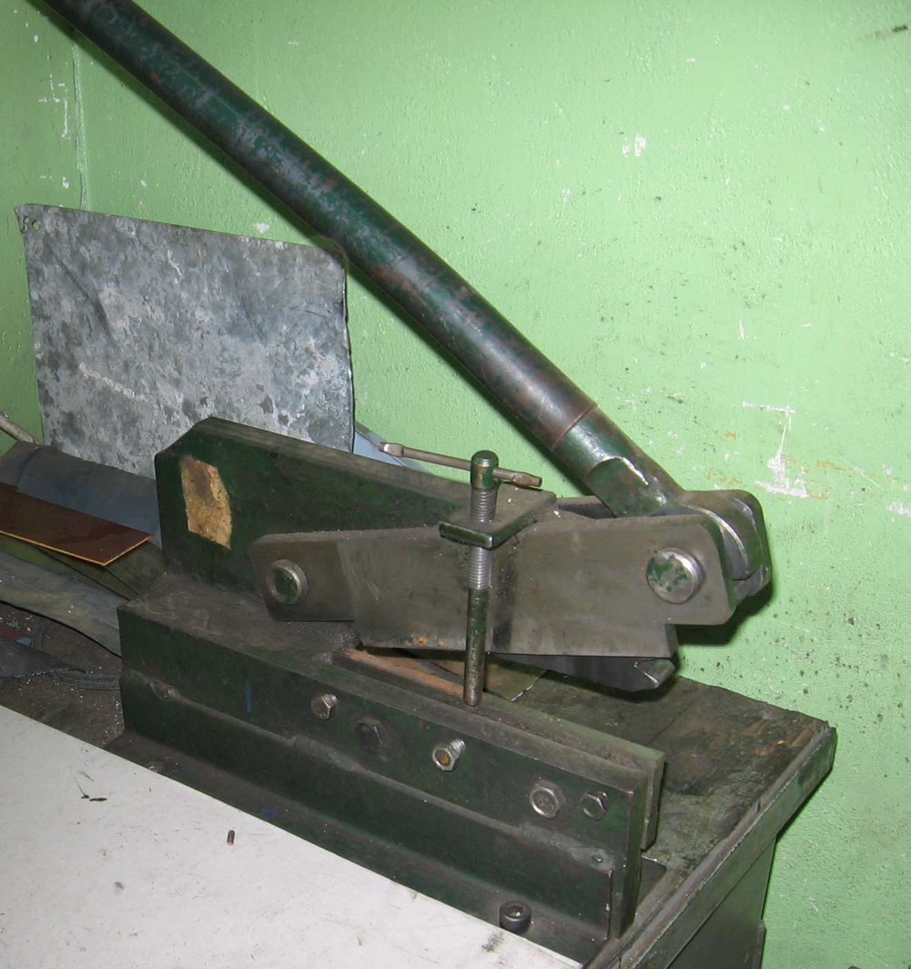 nożyce stołowe ("gilotyna") do blach